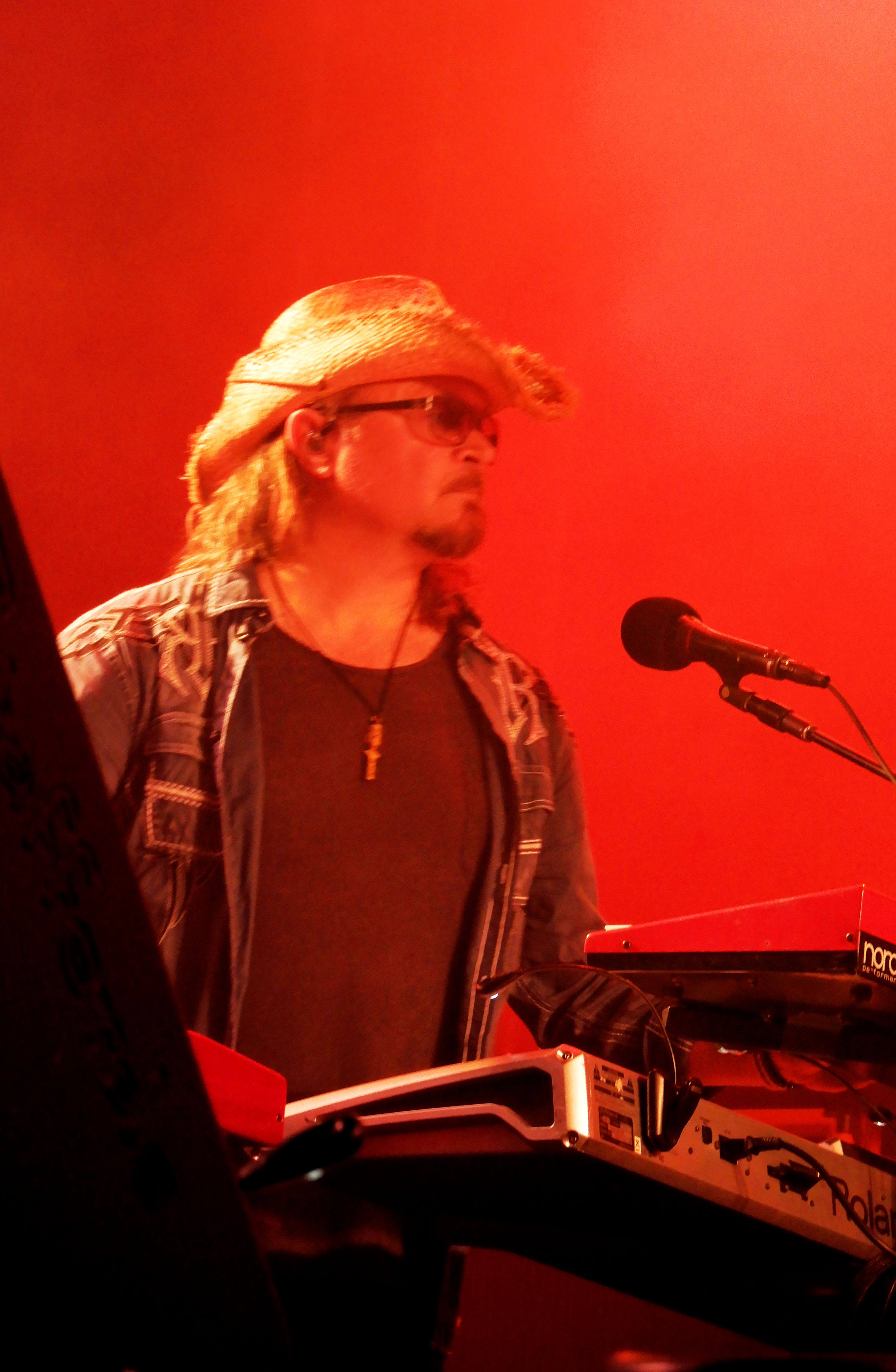 Mic Michaeli (Europe) au Festival Estival de Trélazé en 2019